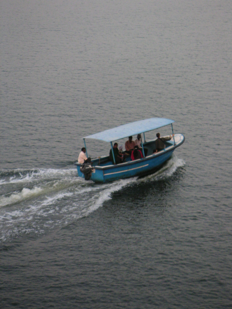 Kollam